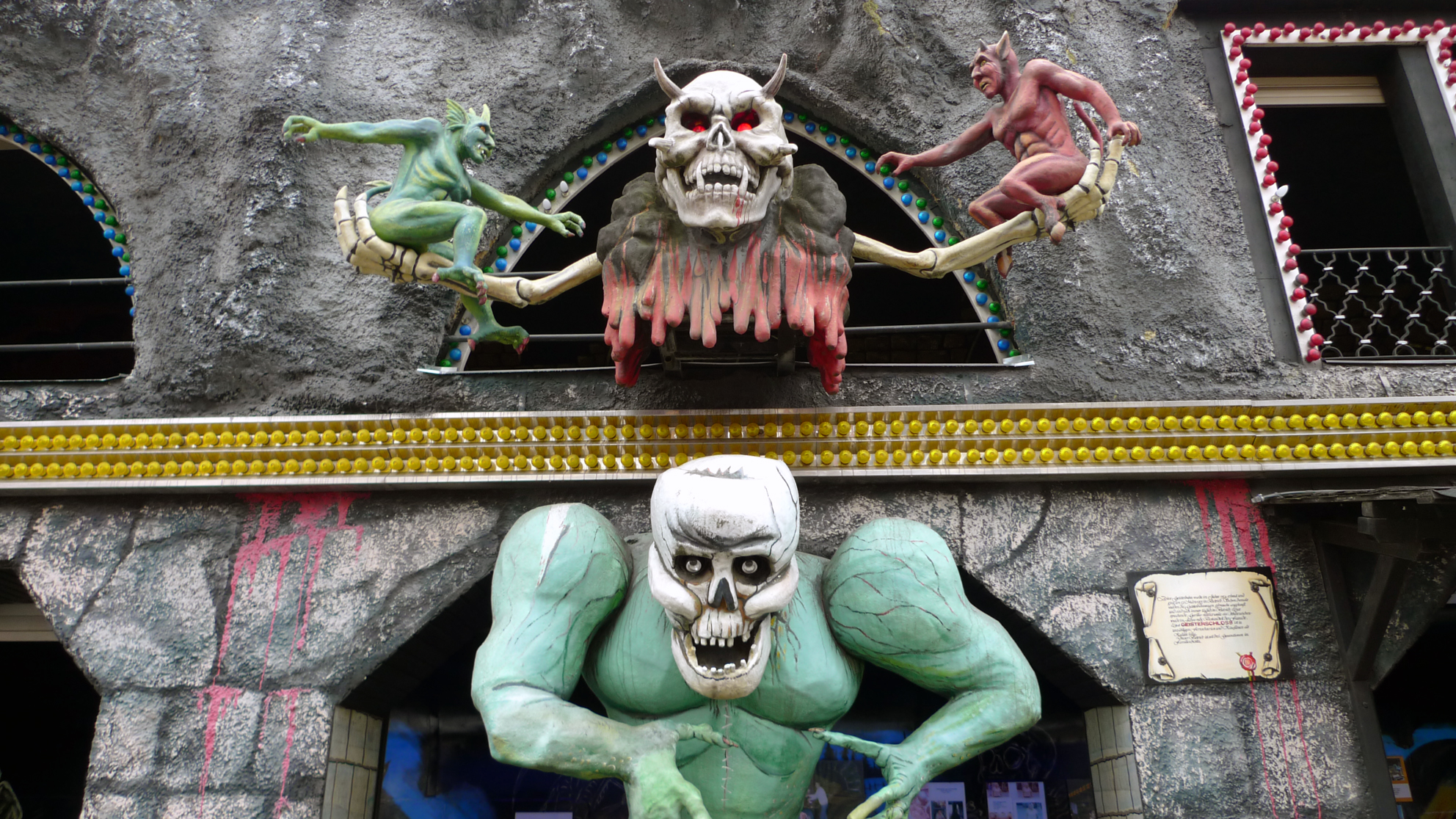 Vienna